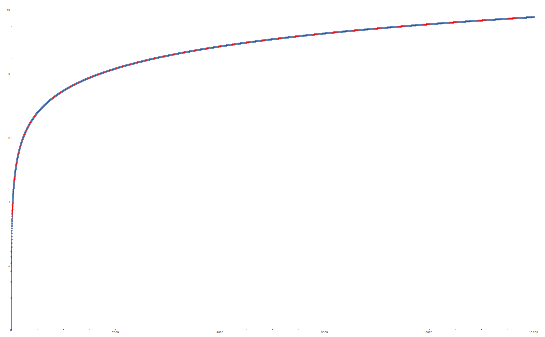 第n个调和数与Log n 的图像